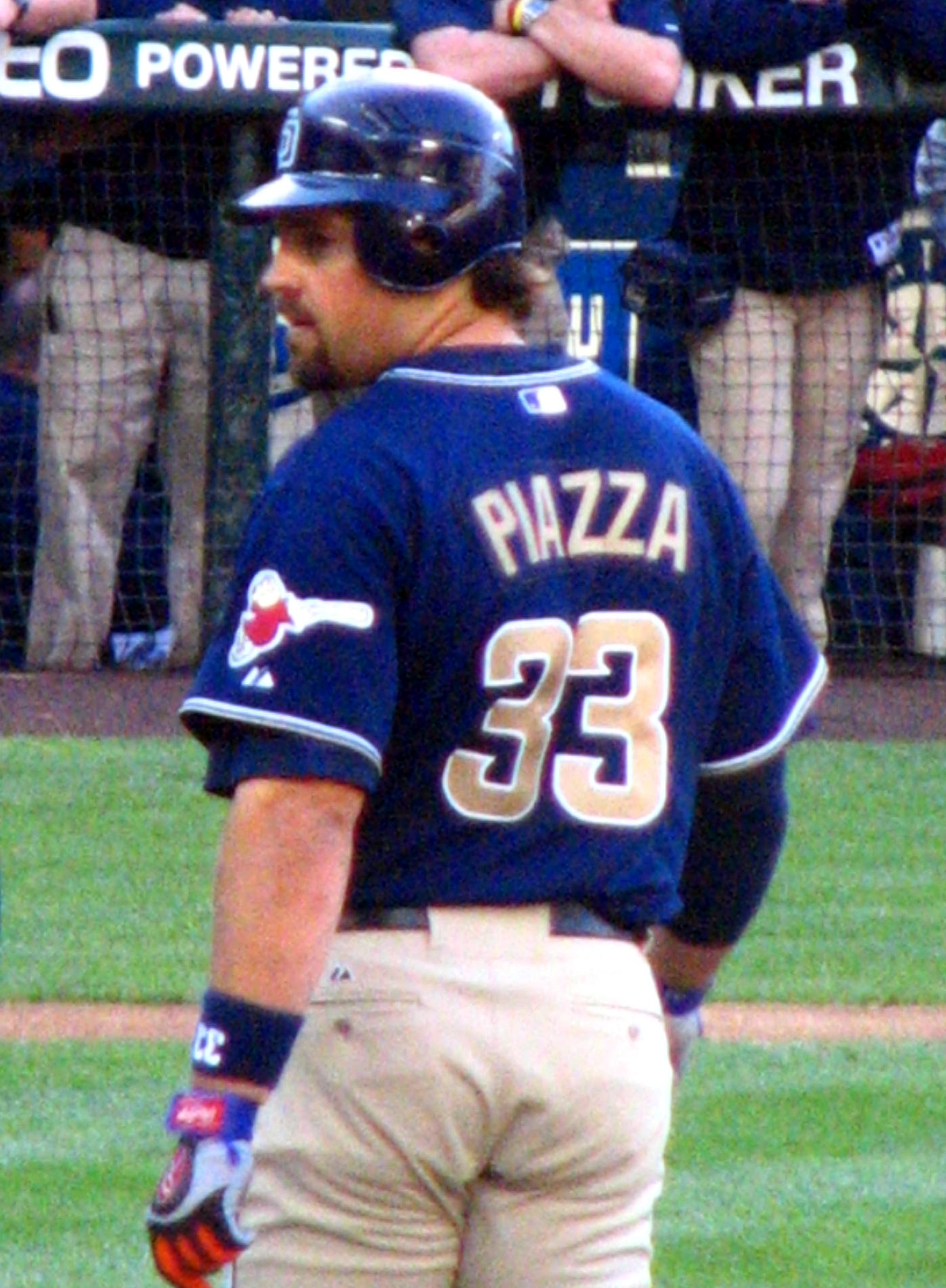 Mike Piazza